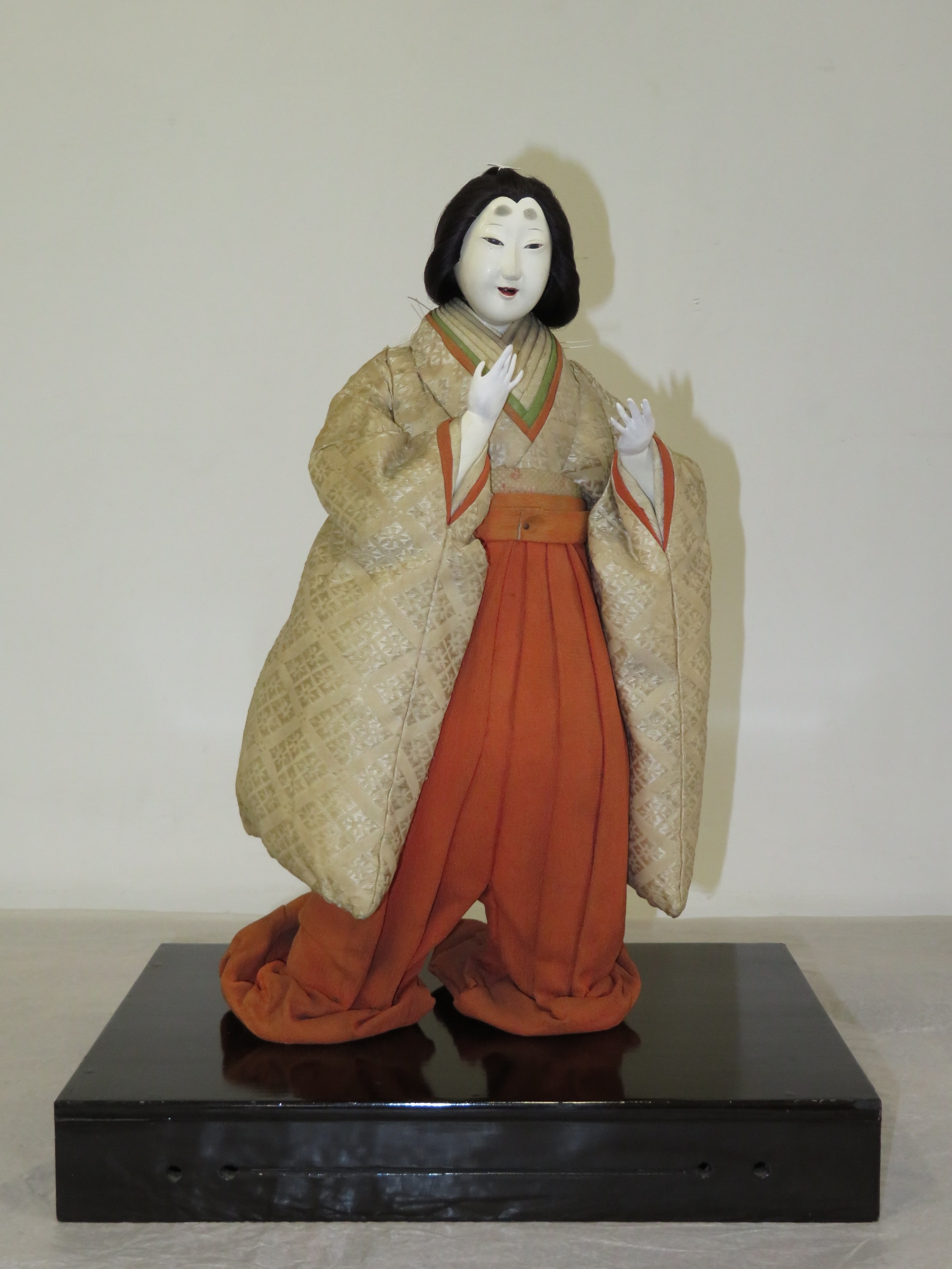 2018年2月27日-3月18日 東京国立博物館展示風景